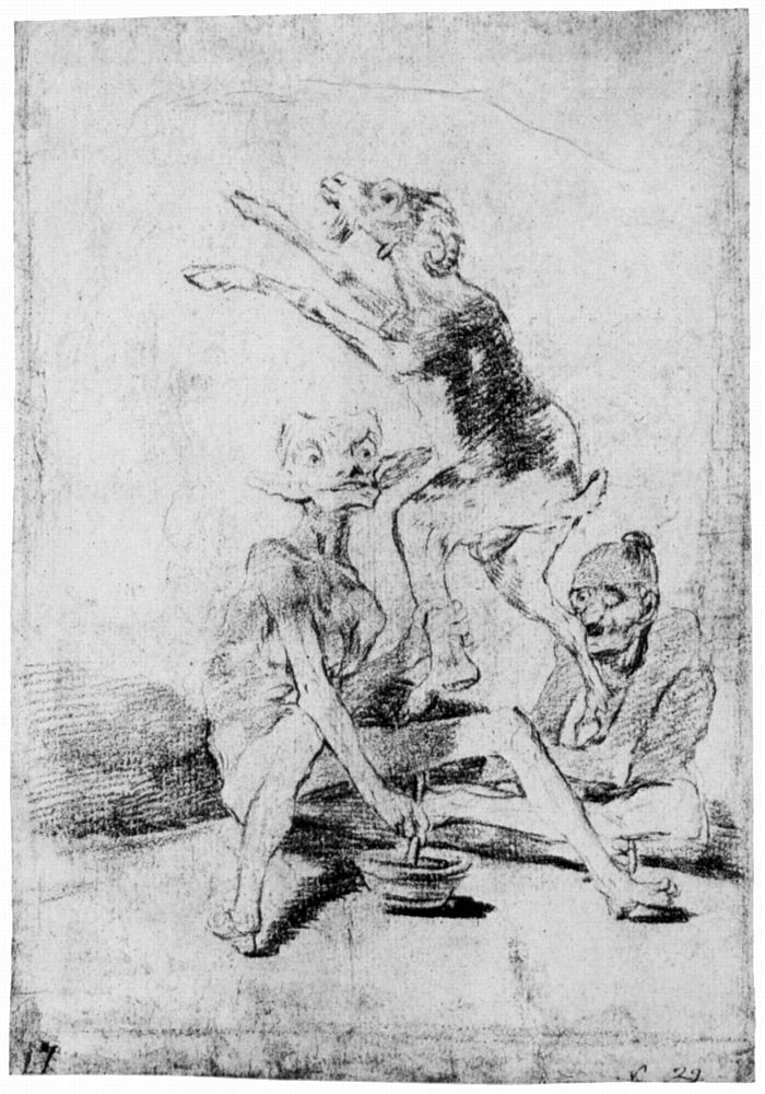 Dibujo preparatorio del capricho nª 67.